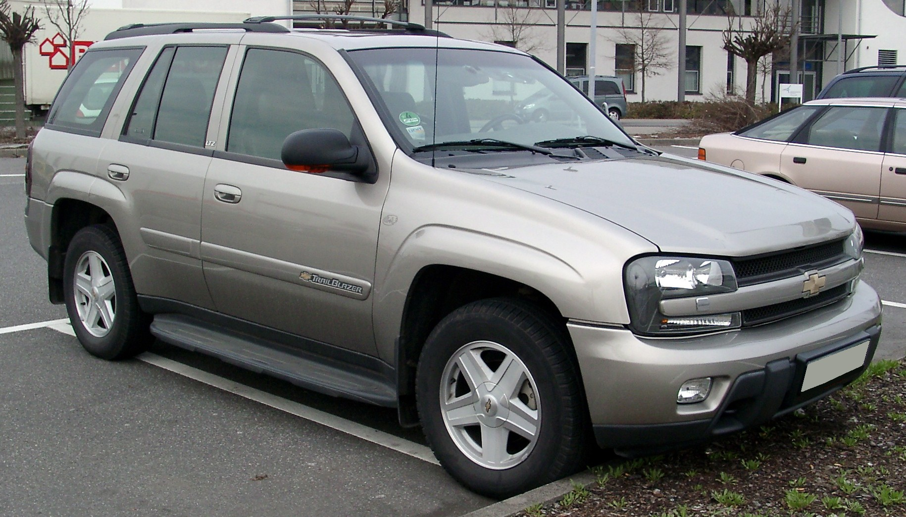 Chevrolet TrailBlazer